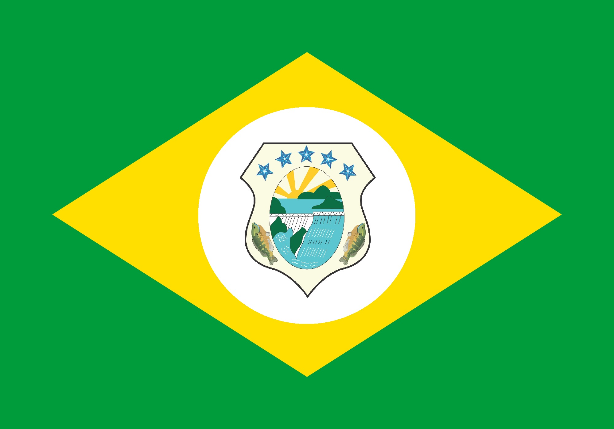 Bandeira municipal de Banabuiú - ce